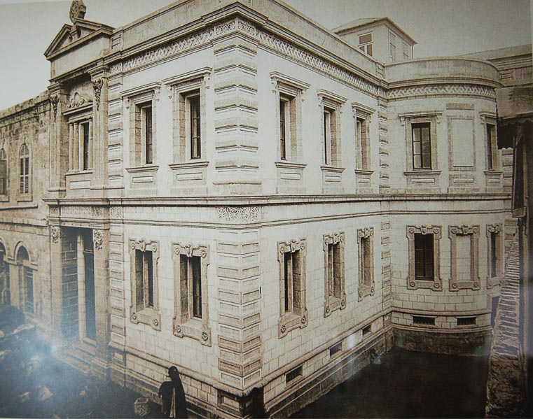 Александровское подворье в Иерусалиме. Фото Ф.М. Тимона. Конец XIX в.